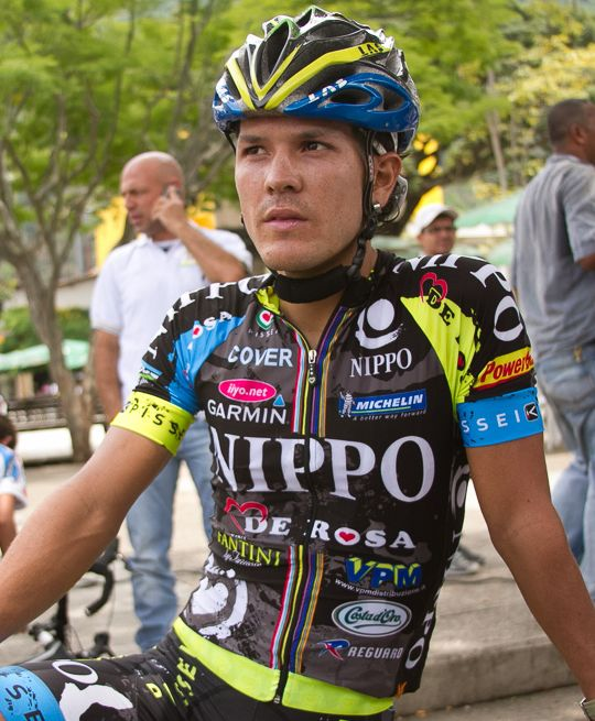 Ciclista colombiano Julián Arredondo, integrante del equipo japonés Nippo-De Rosa